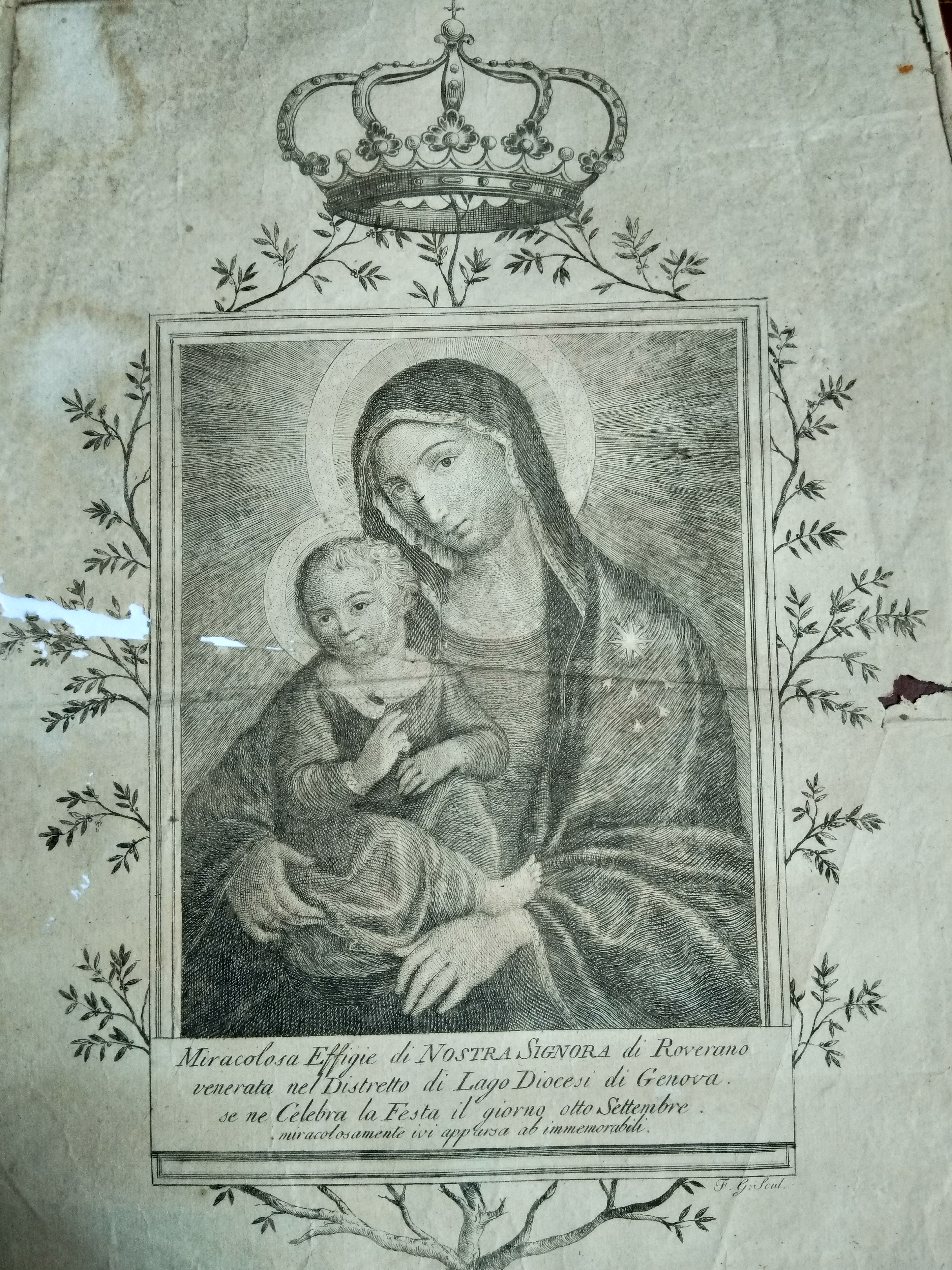 antica incisione settecentesca raffigurante la vera effigie dell'immagine miracolosa